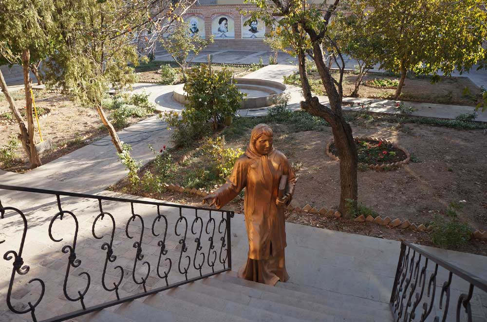 Tabriz, Iran